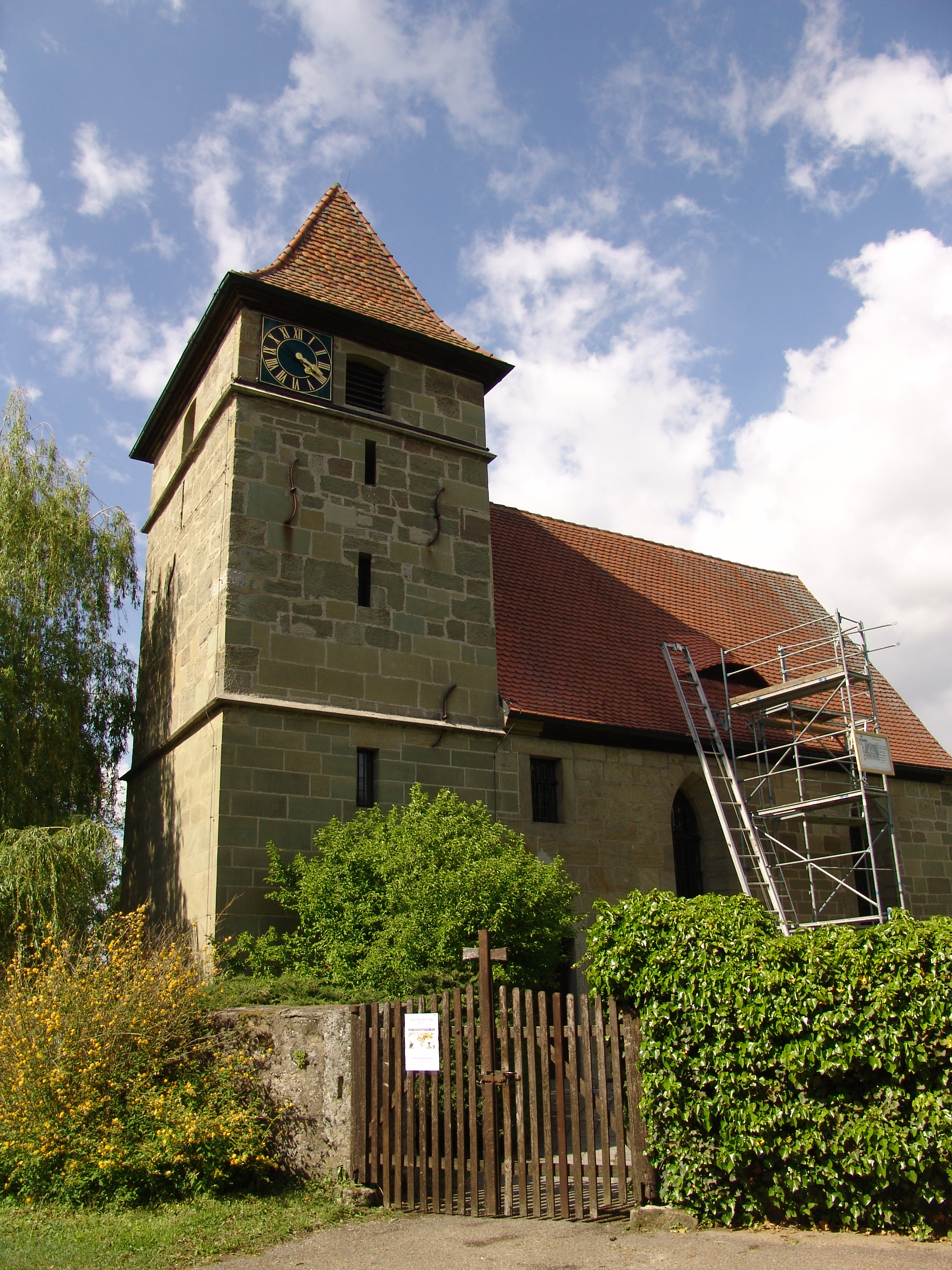 evang.-luth. Kirche St. Alban in Untergailnau